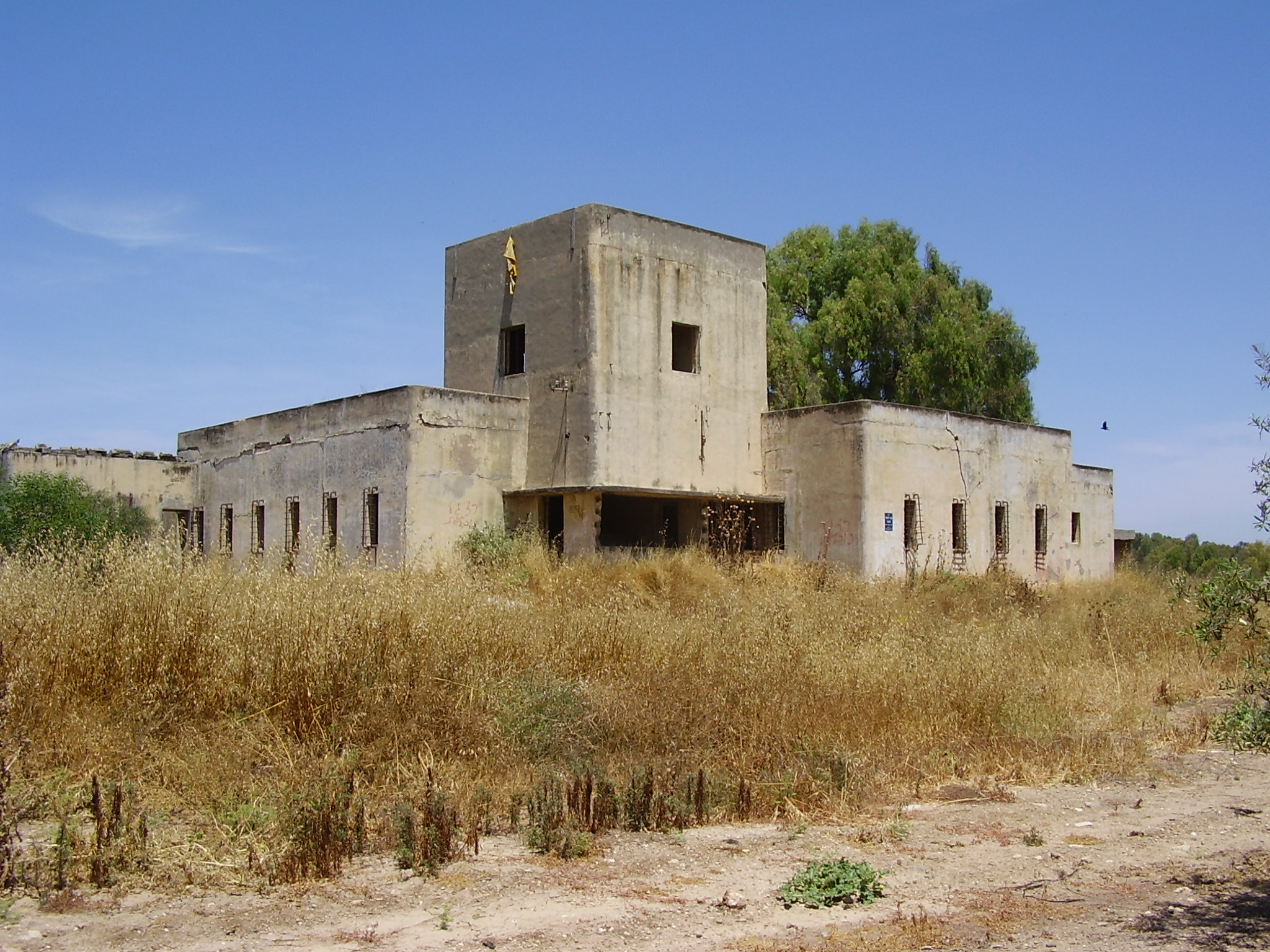 משטרת בטאני ליד באר טוביה. הבנין נטוש. נקראת גם משטרת בית דראס על שם הכפר הערבי שהיה בסביבה